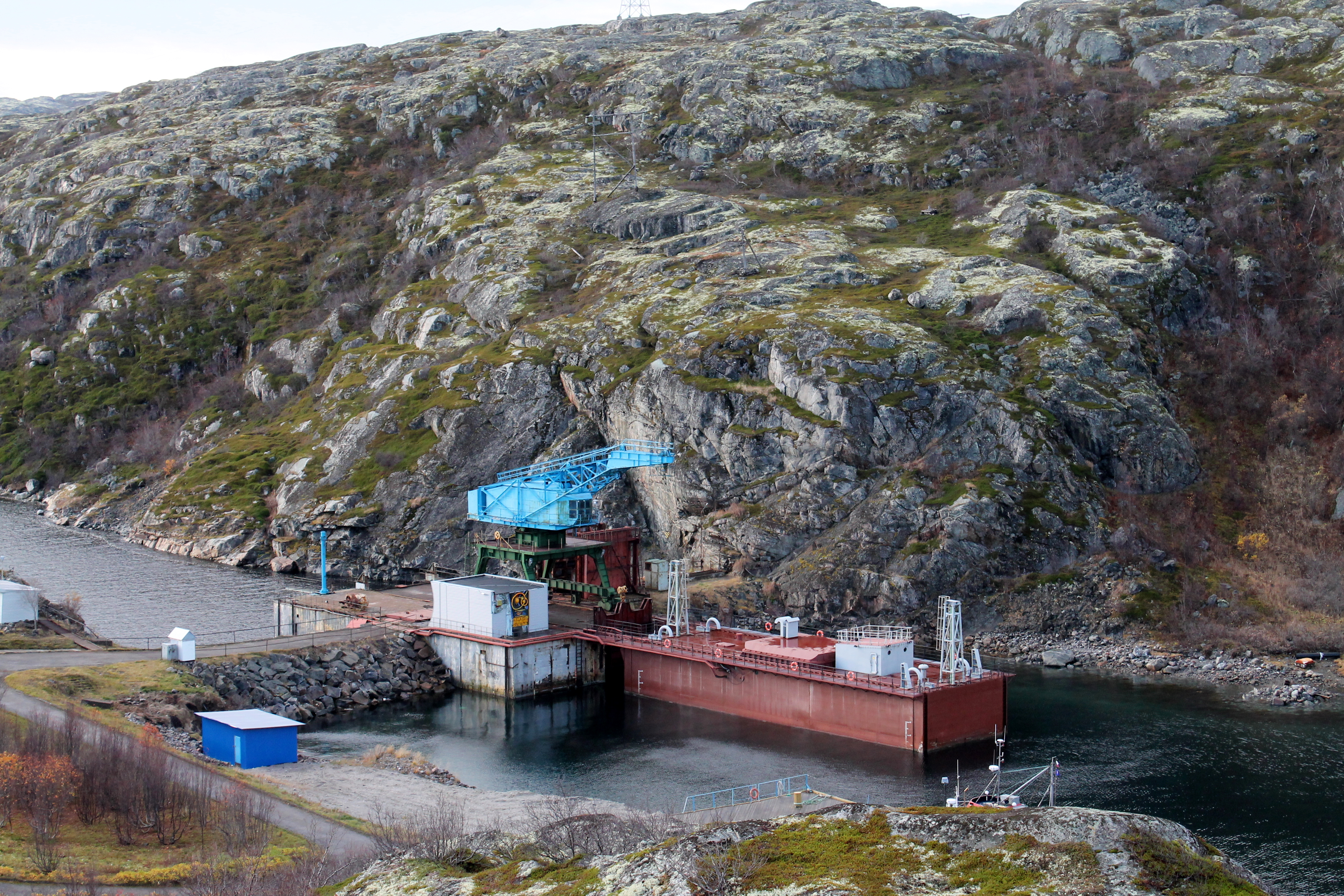 Кислогубская ПЭС